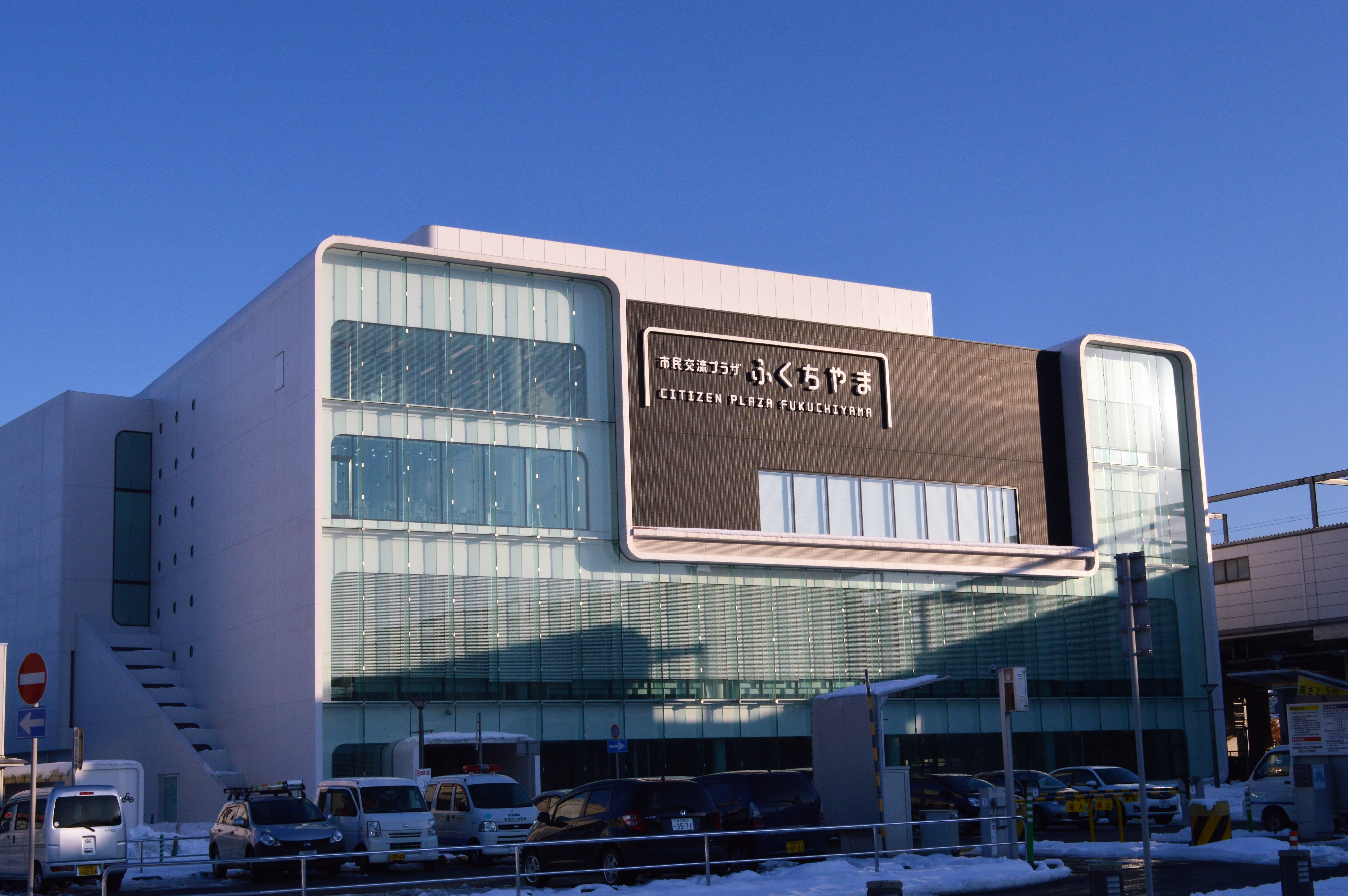 京都府福知山市の市民交流プラザふくちやま。福知山市立図書館中央館が入っている。